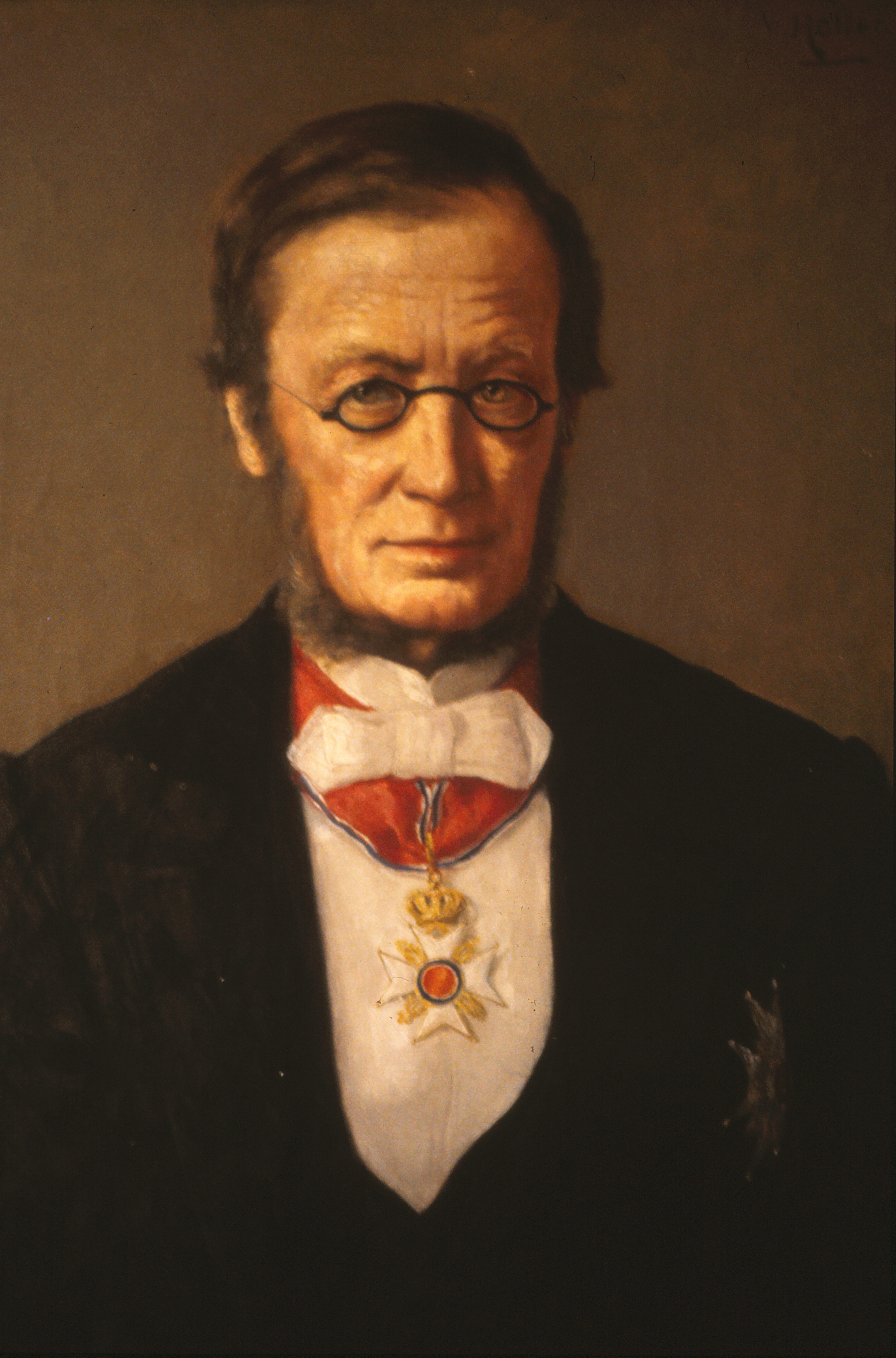 Format: Dias. Maleri avfotografert av Byantikvaren, Trondheim, ukjent dato. Sted / Place: Trondheim katedralskole, Trondheim. Eier / Owner Institution: Trondheim byarkiv, The Municipal Archives of Trondheim. Arkivreferanse / Archive reference: Byantikvarens lysbildesamling - A3.S3.B046